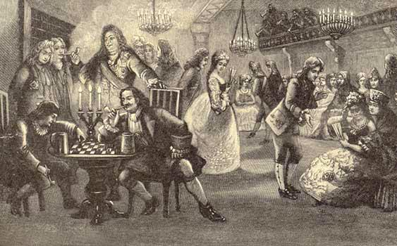 New russian life style at Peter I. Noble people at the "assembly". From the book: Глинский Б.Б. Царские дети и их наставники: Исторические очерки для юношества. – Изд. 2-е, с портретами, снимками с исторических картин, видами и др. иллюстрациями. – СПб.; М.: 1912